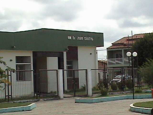 Fórum da Comarca de Santa Rita de Cássia, cidade localizada no oeste do estado da Bahia.